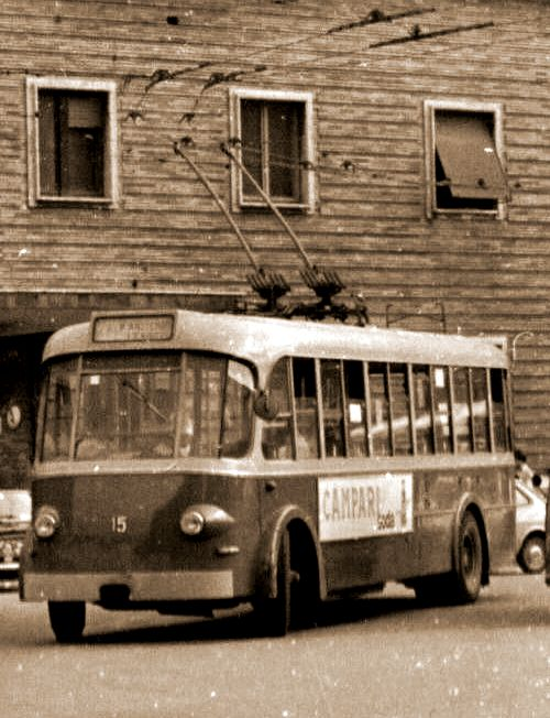 Filobus Fiat 668F OMS n. 15, davanti alla stazione ferroviaria di Ancona